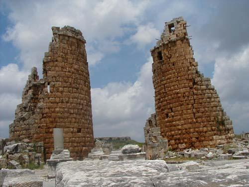 Najbardziej charakterystyczna budowla wśród ruin Perge. Brama ceremonialna z III w.p.n.e Składała się z dwóch okrągłych wież za którymi znajdował się niewielki plac otoczony wysokimi, przylegającymi do wież murami. W murach pierwotnie pokrytych płytami marmurowymi znajdowały sie nisze. Jedynie postumenty posągów z tych nisz zachowały sie do naszych czasów. W czasach rzymskich kompleks bramy uzupełniono ostatnim elementem tj. bramą w kształcie piętrowego łuku triumfalnego (fundacja najwyższej kapłanki Palancji Magny)